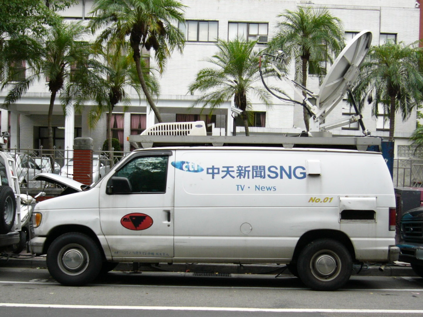 中天新聞1號SNG車左方外觀，車型為Ford Econoline 250。